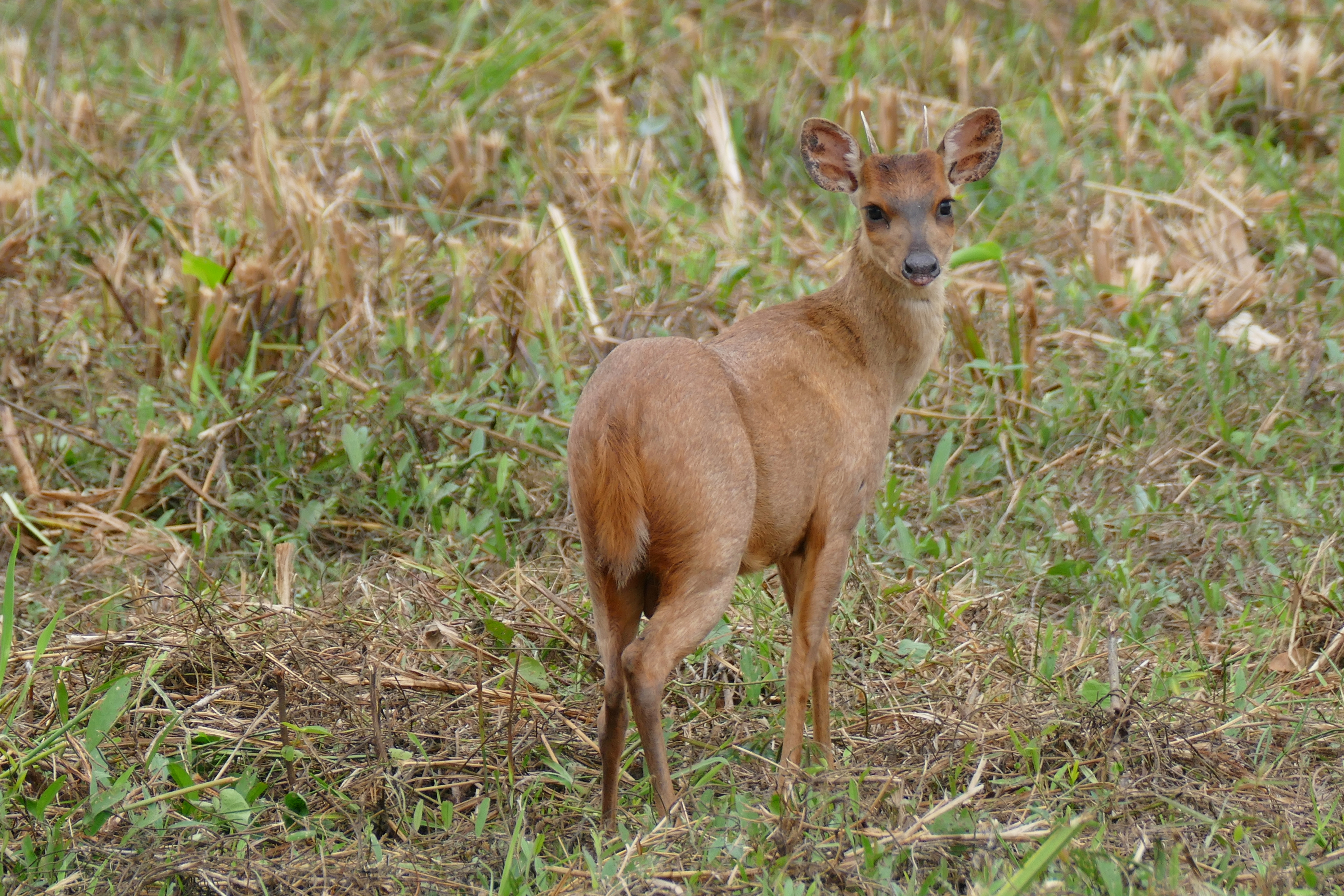 Parque Baia das Pedras, Porto Cercado Area, Poconé, Mato Grosso, BRAZIL